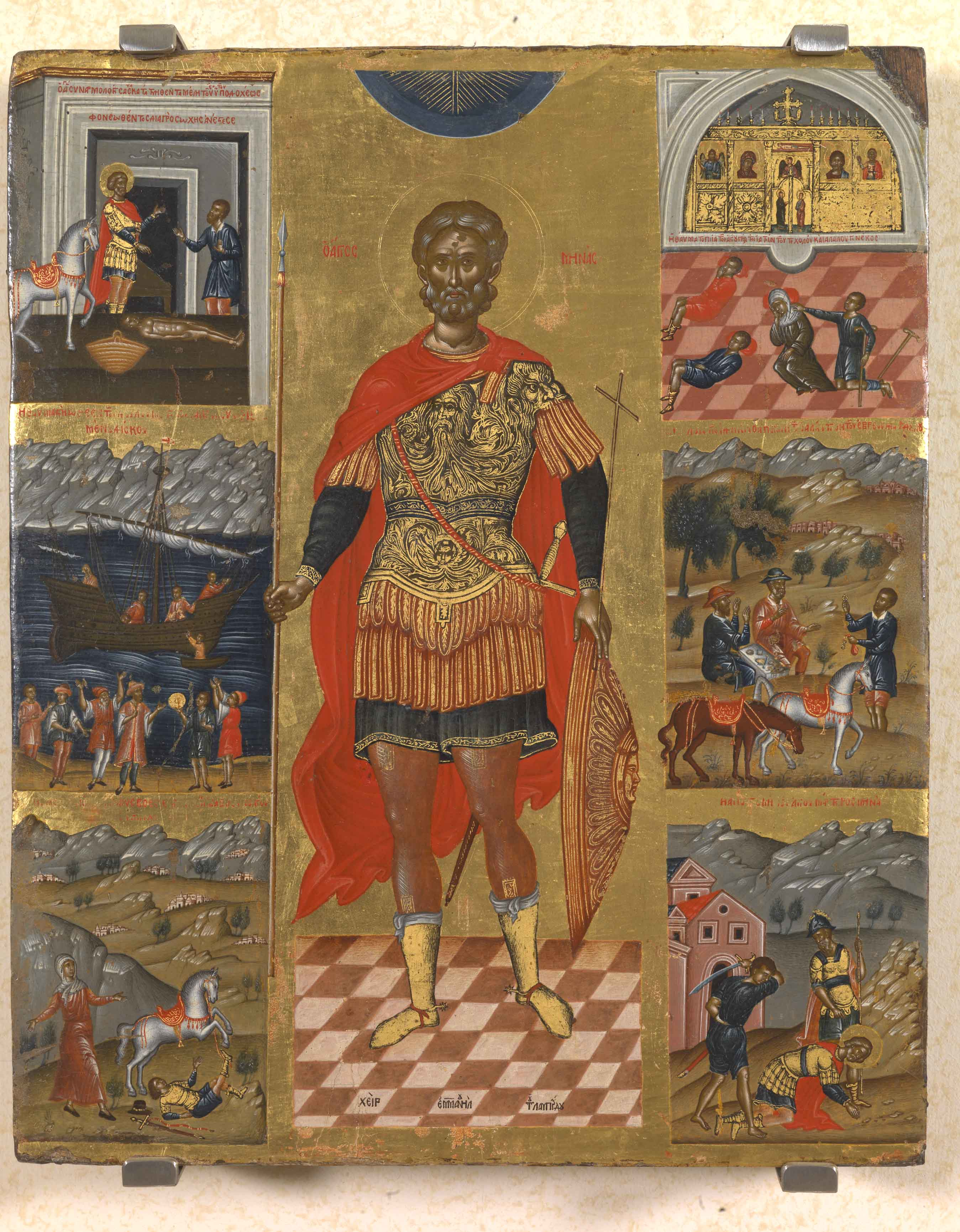 Ο Άγιος Μηνάς με σκηνές από τον βίο του πρώτες δεκαετίες 17ου αιώνα, 32x39εκ. Εμμανουήλ Λαμπάρδος "ΧΕΙΡ ΕΜΜΑΝΟΥΗΛ ΤΟΥ ΛΑΜΠΑΡΔΟΥ" Στο κέντρο εικονίζεται ο άγιος Μηνάς, ως αιγύπτιος μεσήλικας στρατηλάτης. Φοράει στρατιωτική ενδυμασία με πορφυρό μανδύα, κρατεί δόρυ στο δεξί χέρι και με το αριστερό την ασπίδα του και σταυρό. Αριστερά και δεξιά υπάρχουν ανά τρία εικονίδια με τα θαύματα και το μαρτύριο του αγίου, σύμφωνα με τη διήγηση του Συναξαριστή. Google Translation of above: Saint Minas with scenes from his early 17th century life, 32x39cm. Emmanuel Lambardos "EMMANOUIL'S HAND OF LAMBARDO" In the center is depicted Saint Minas, an Egyptian middle-aged soldier. He wears a military uniform with a purple cloak, holds a spear in his right hand and with his left shield and cross. To the left and right there are three icons with the miracles and the martyrdom of the saint, according to the story of the Constable.